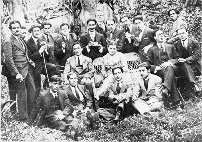 Generación del trece